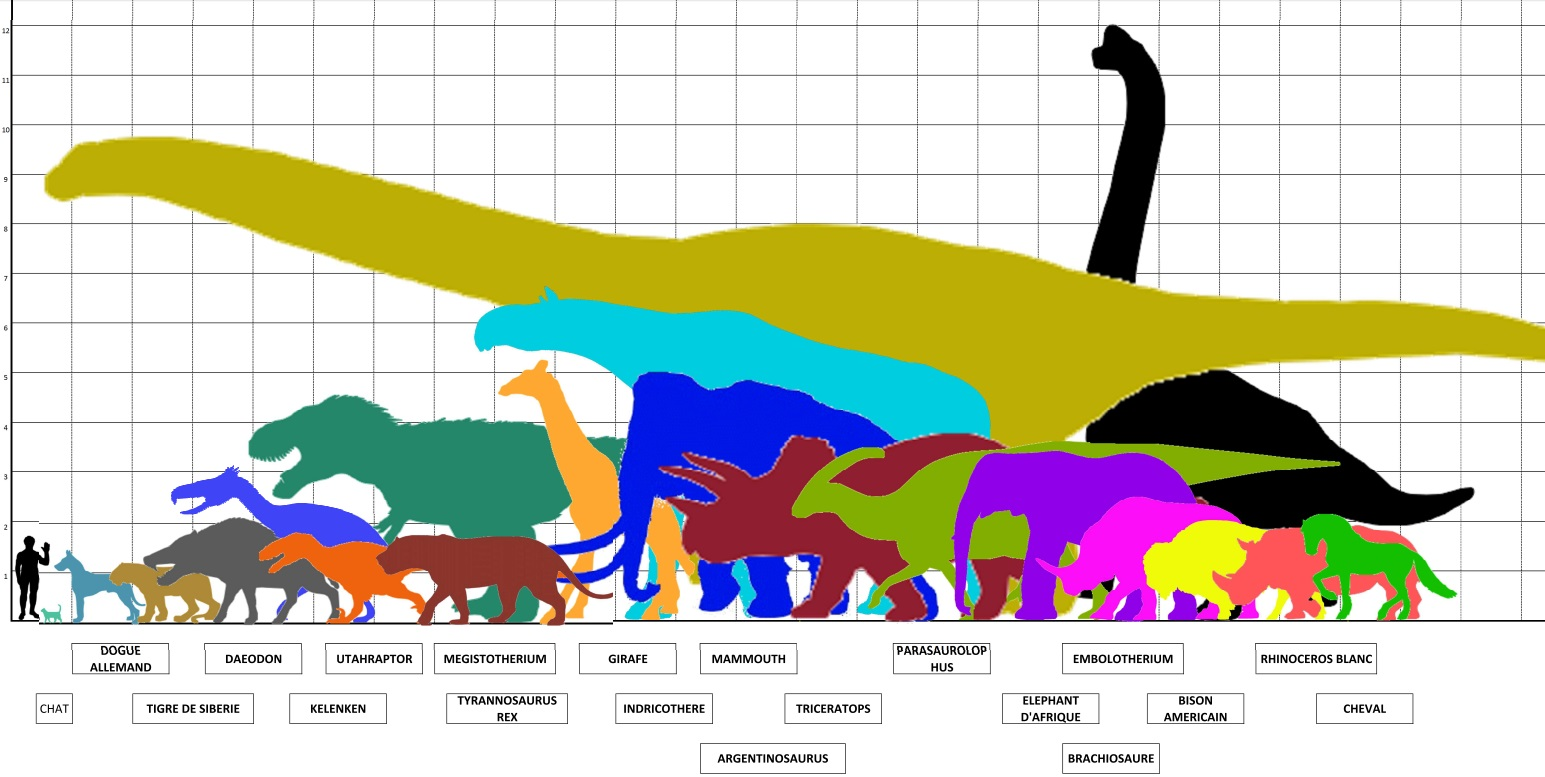 Comparatif des tailles de différents animaux préhistoriques et actuels